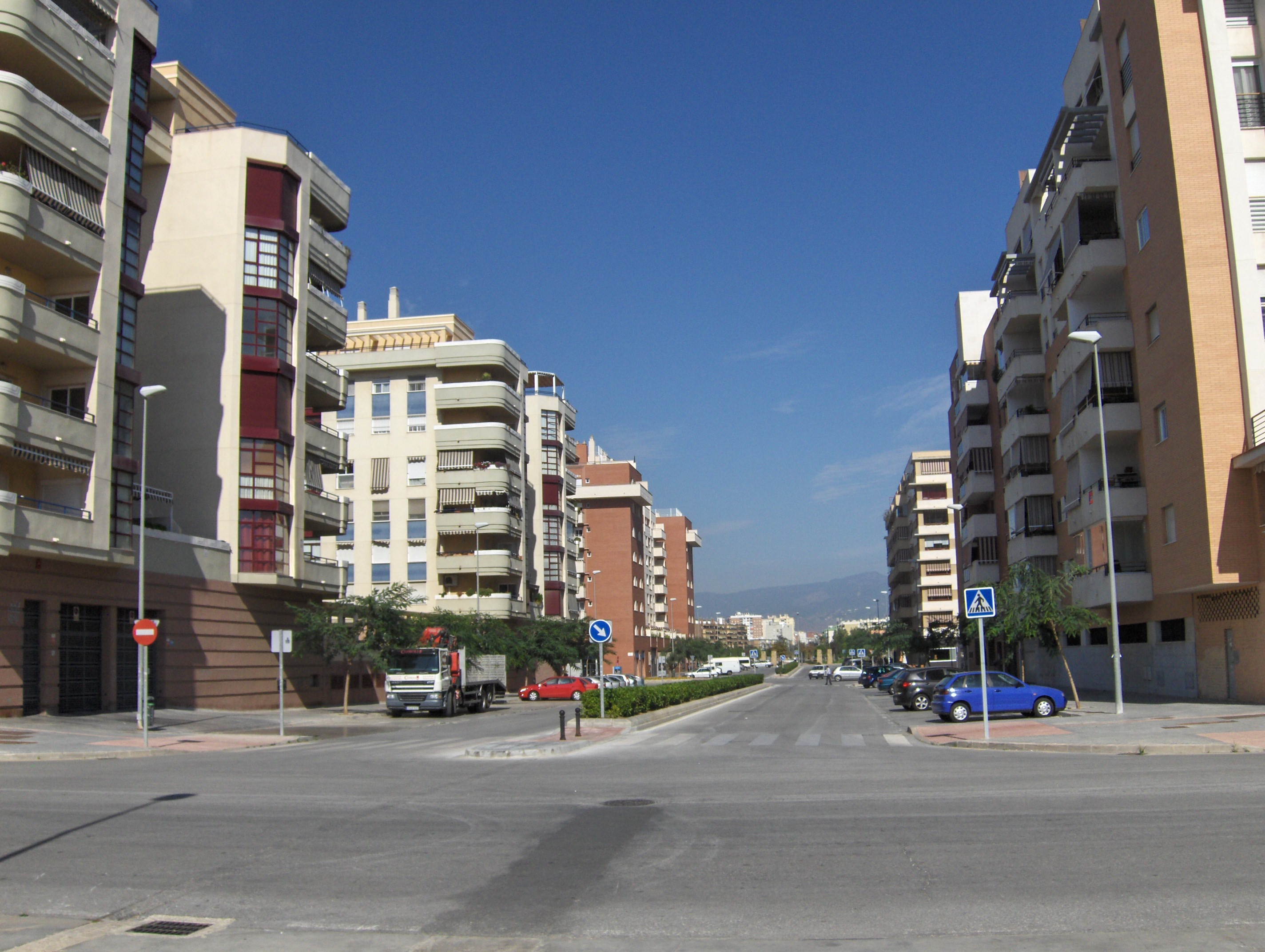 Calle de Concha Lagos, en el barrio de Finca El Pato, Málaga, España.